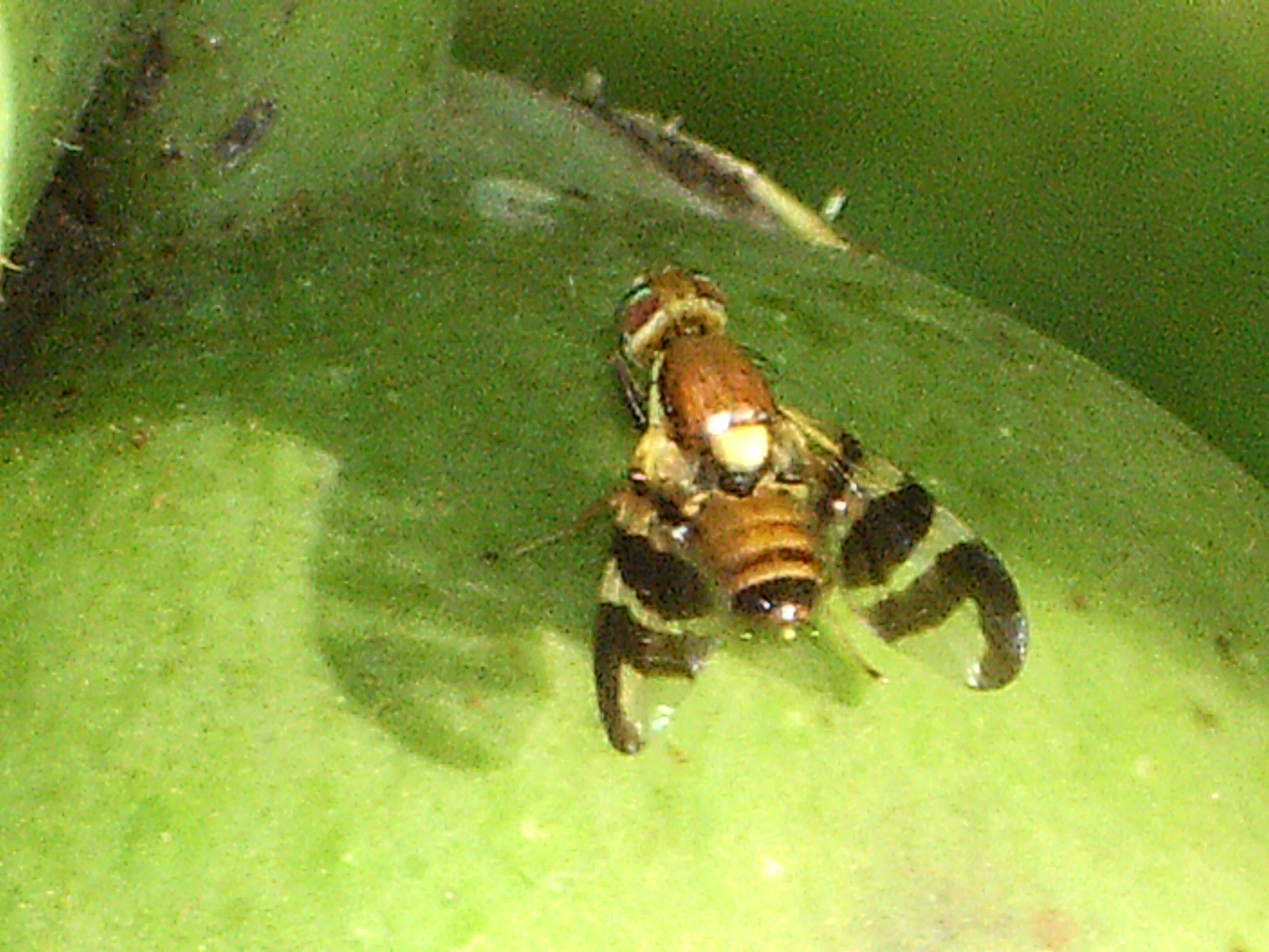 Walnussfruchtfliege (Rhagoletis completa) auf Walnuss, Baden-Württemberg, Kreis Waldshut